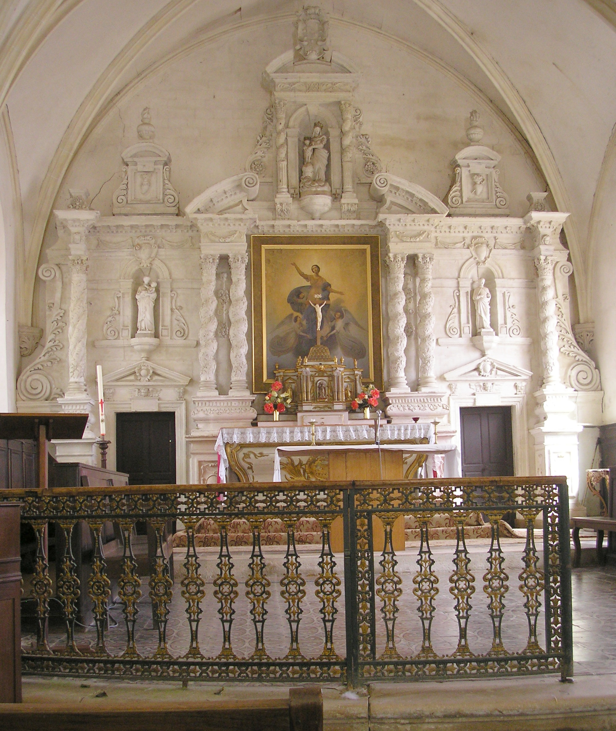 Bellavilliers (Normandie, France). Le maitre-autel de l'église Notre-Dame.